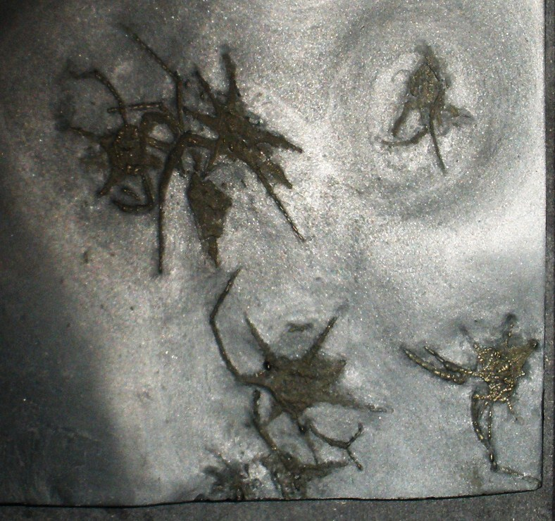 Fossil of Mimetaster, an extinct arthropod- Took the photo at Natural History Museum of Maastricht